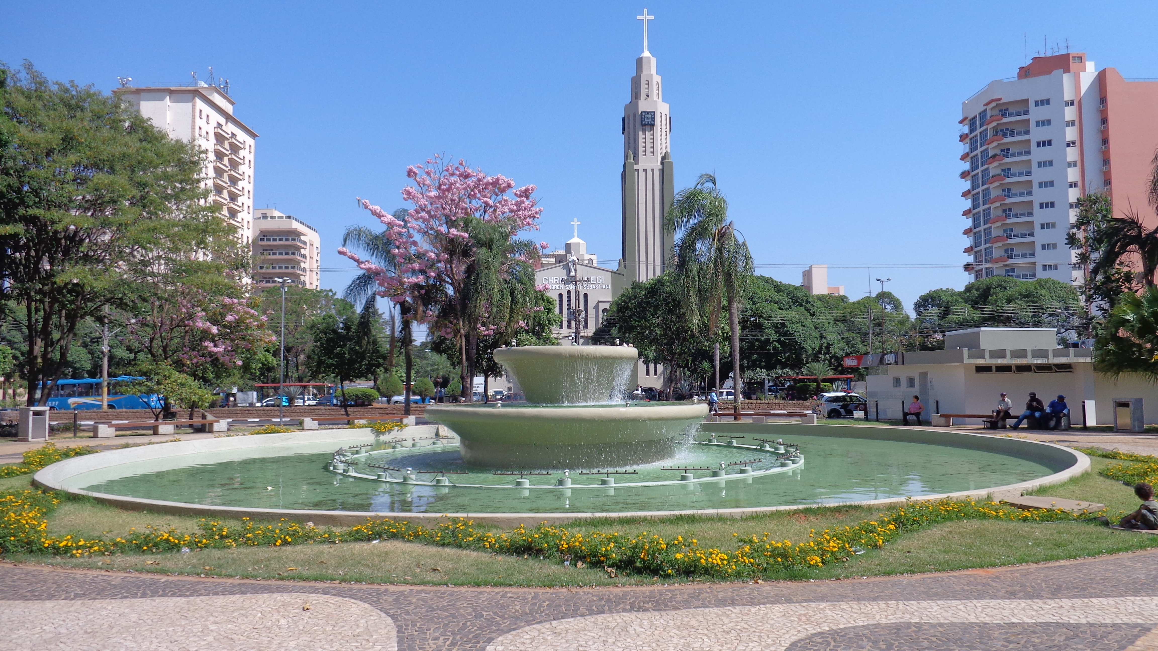 Visão geral Centro de Presidente Prudente